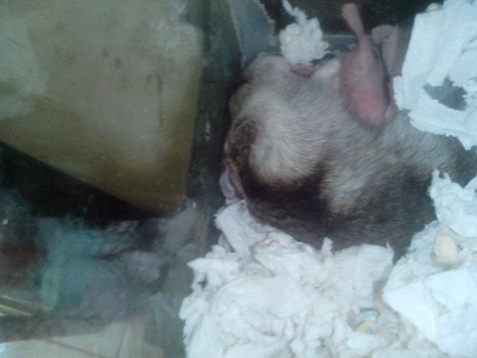 Hamster đang bú sữa mẹ